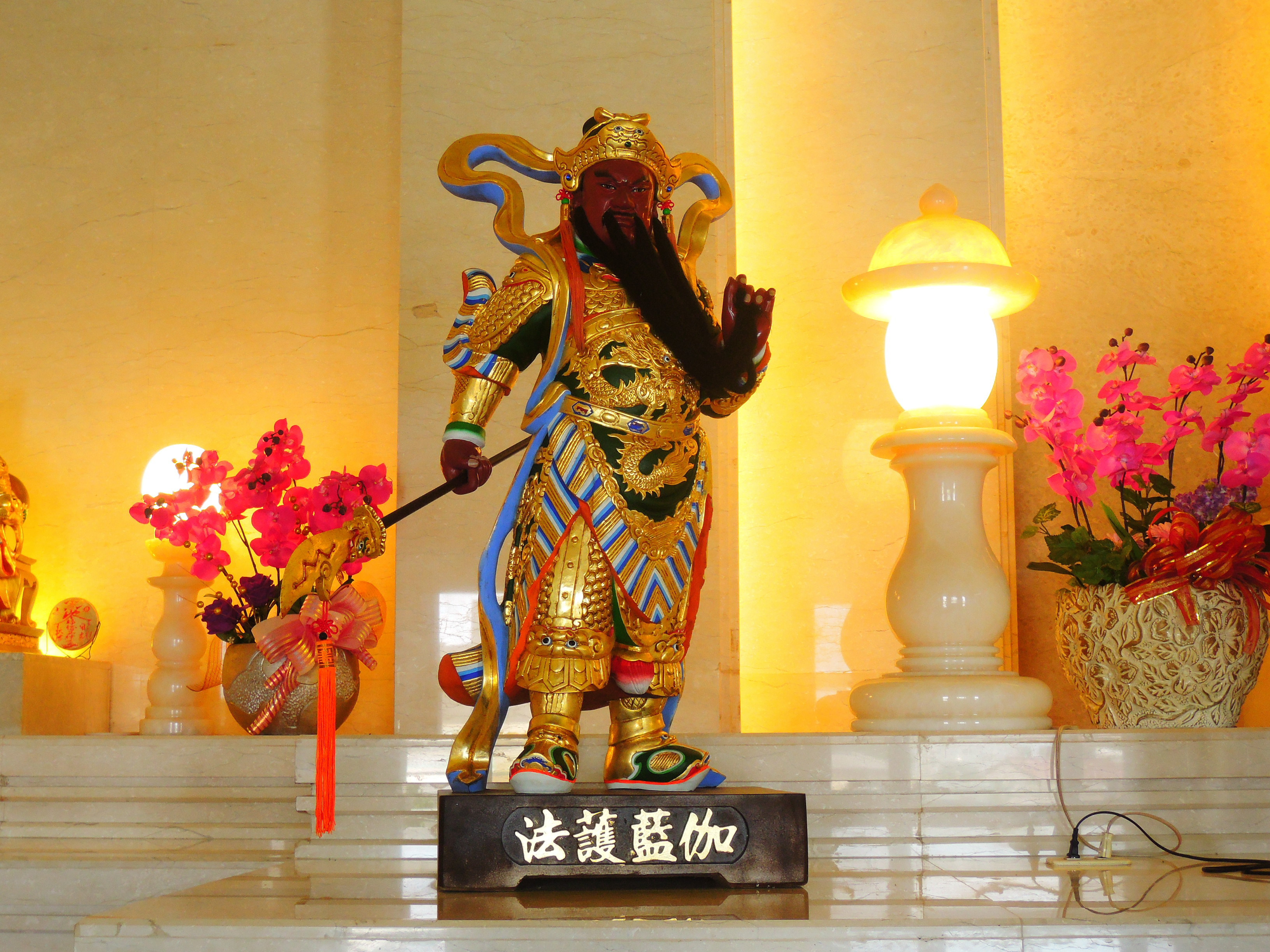 澎湖西嶼鄉大池西林寺，主祀觀音佛祖